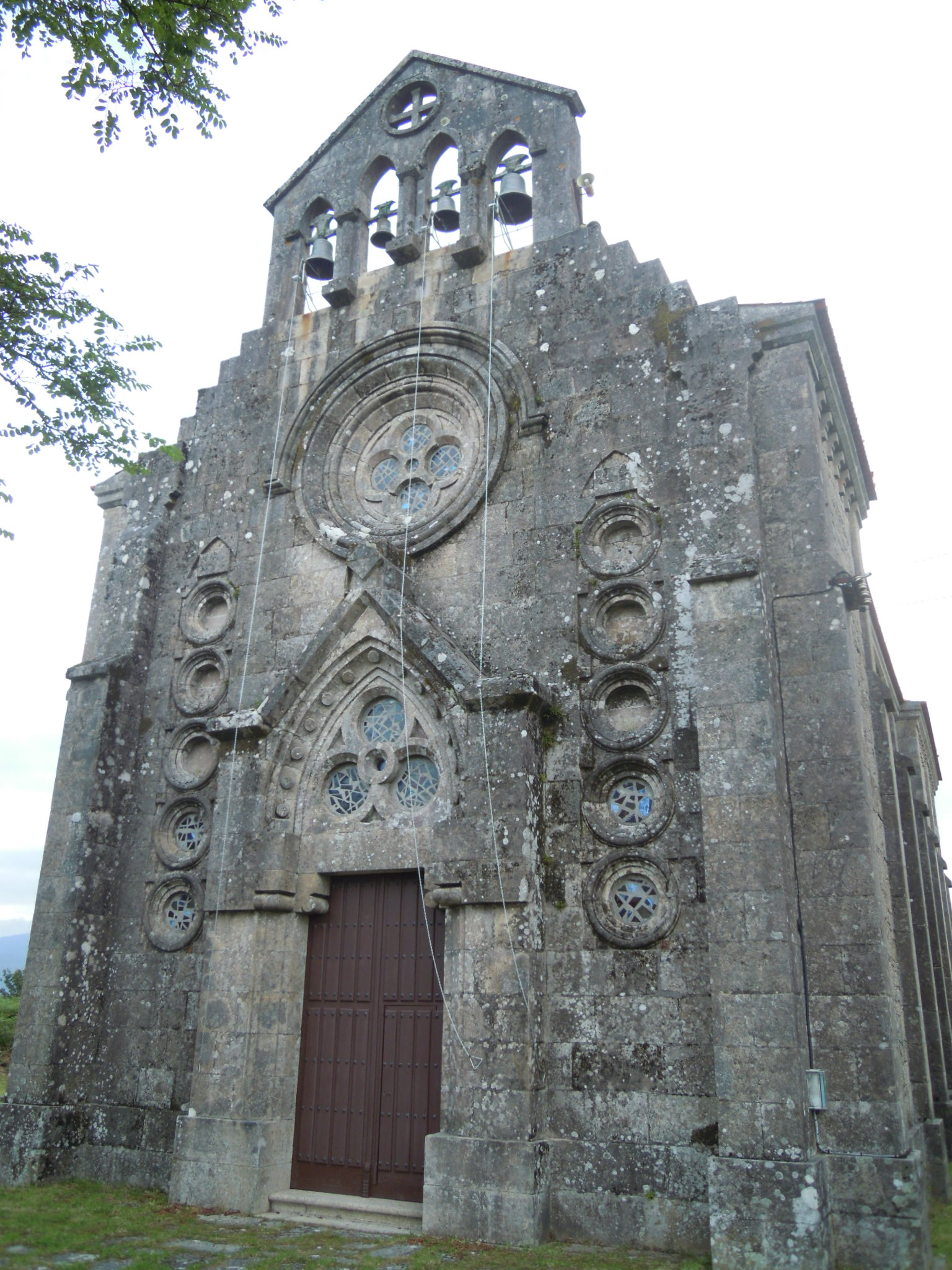 Fachada da igrexa de Caritel (Ponte Caldelas).